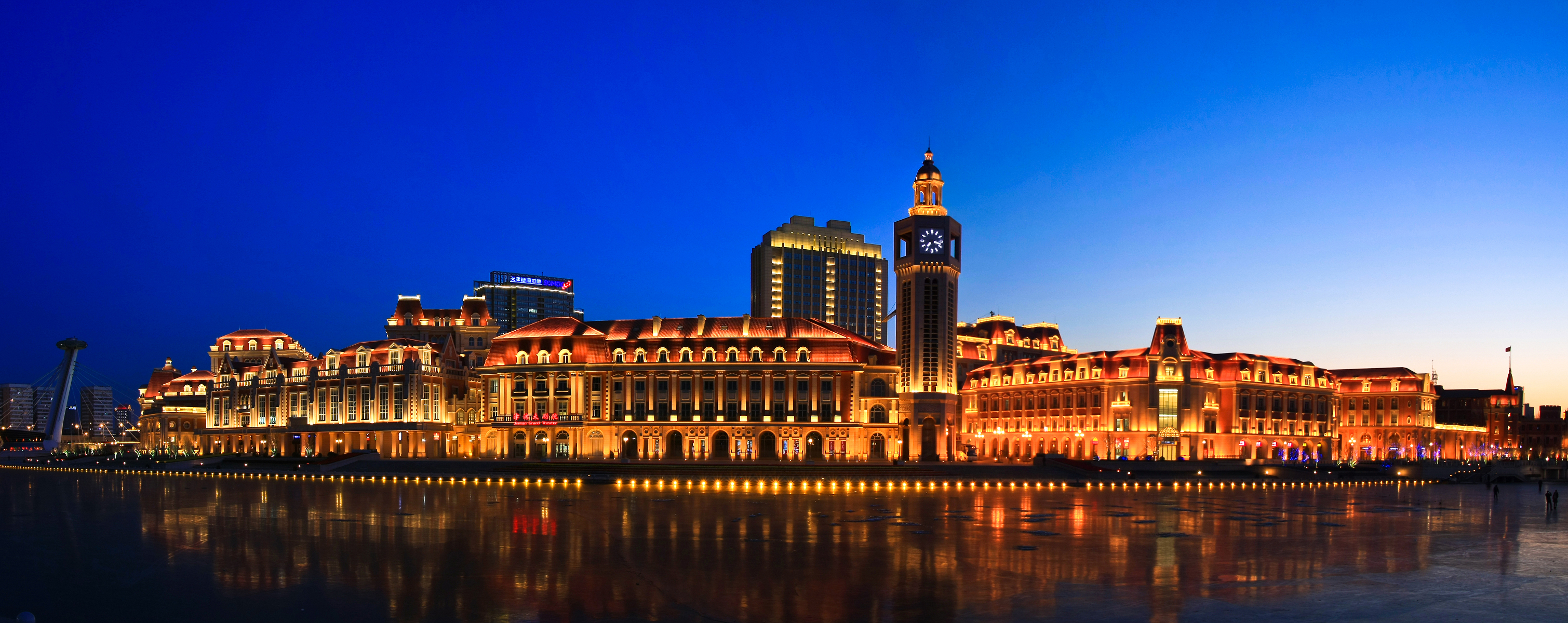 Tianjin Jinwan Plaza